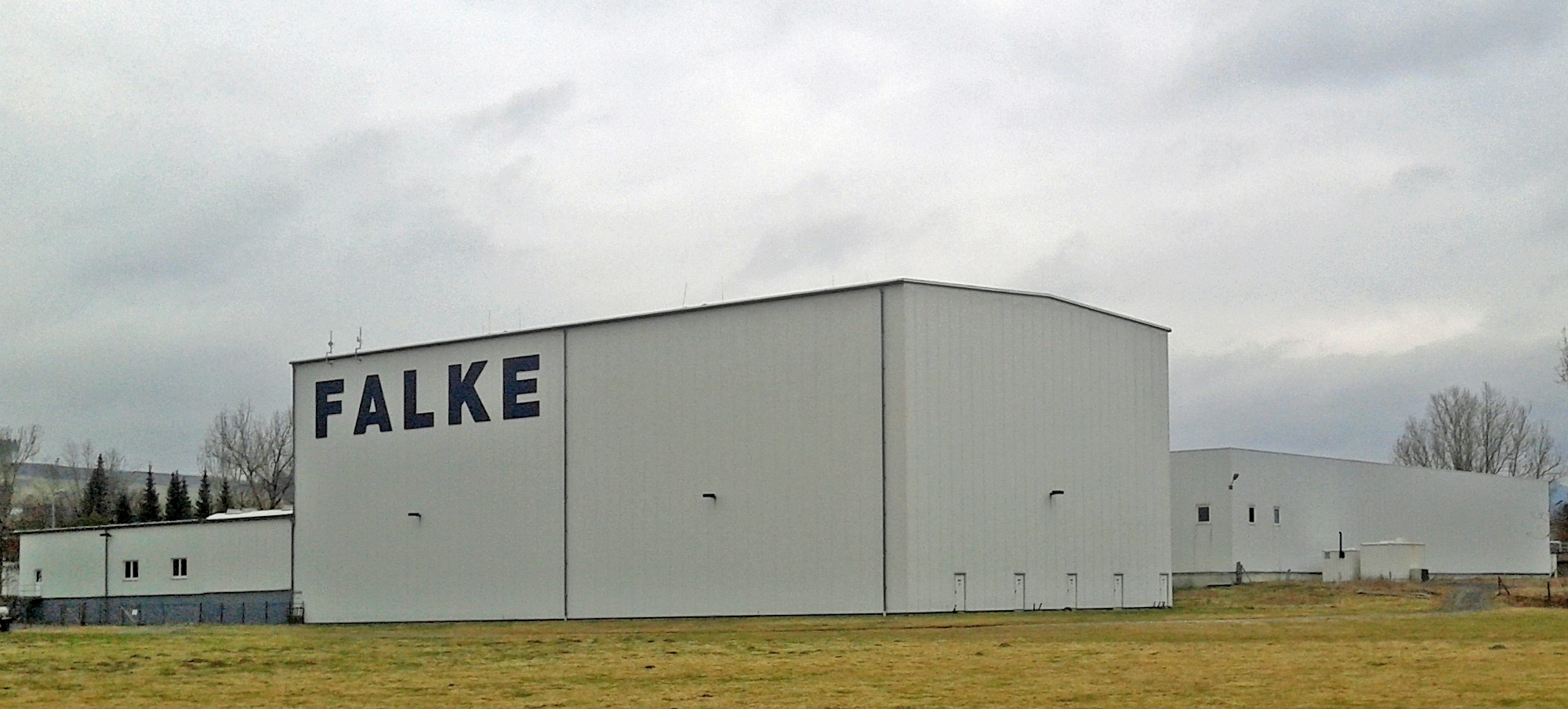 Fa. Falke, Lager in Schmallenberg (Germany)